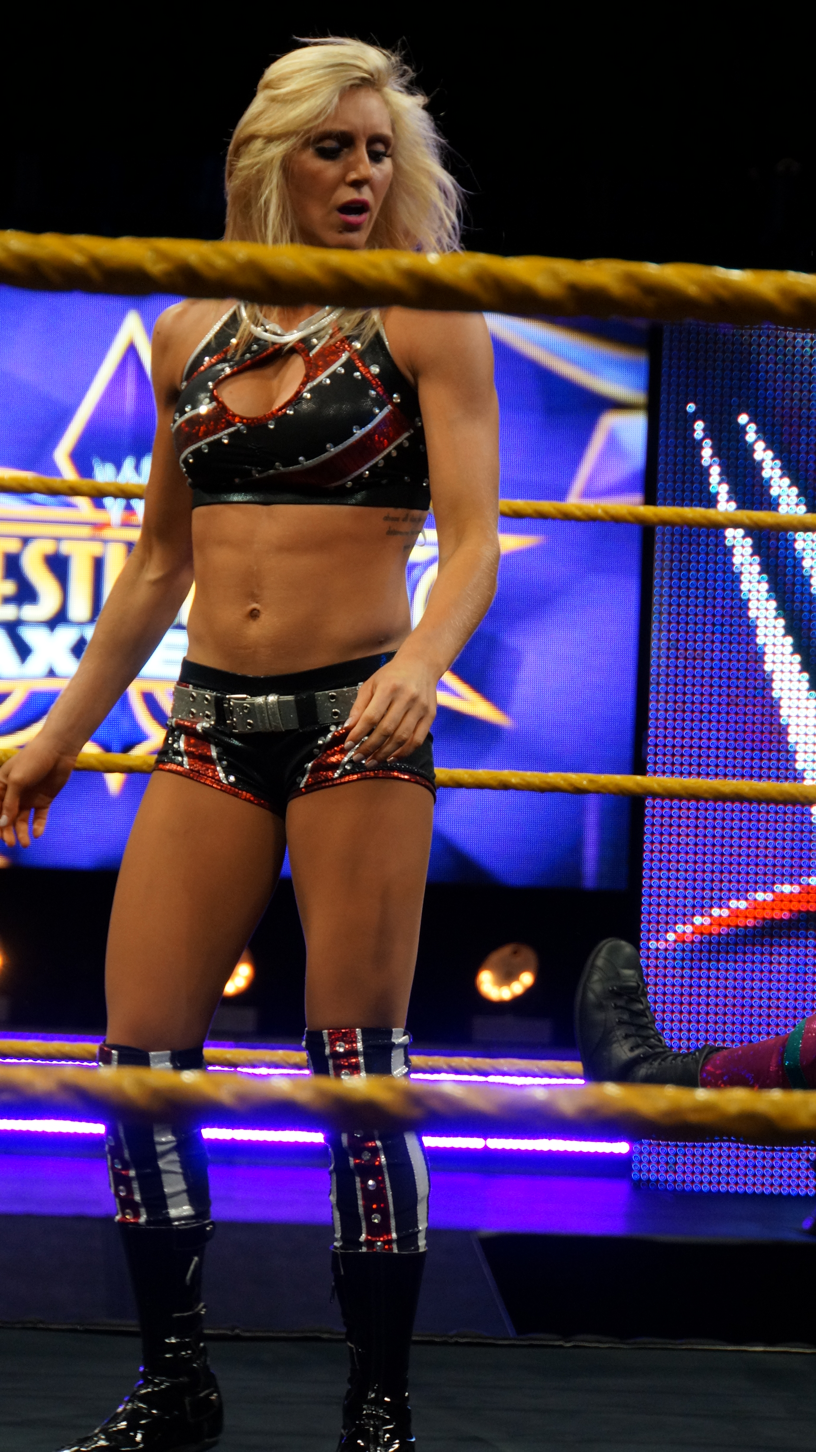 2014-04-03_20-09-37_NEX-6_DSC06078